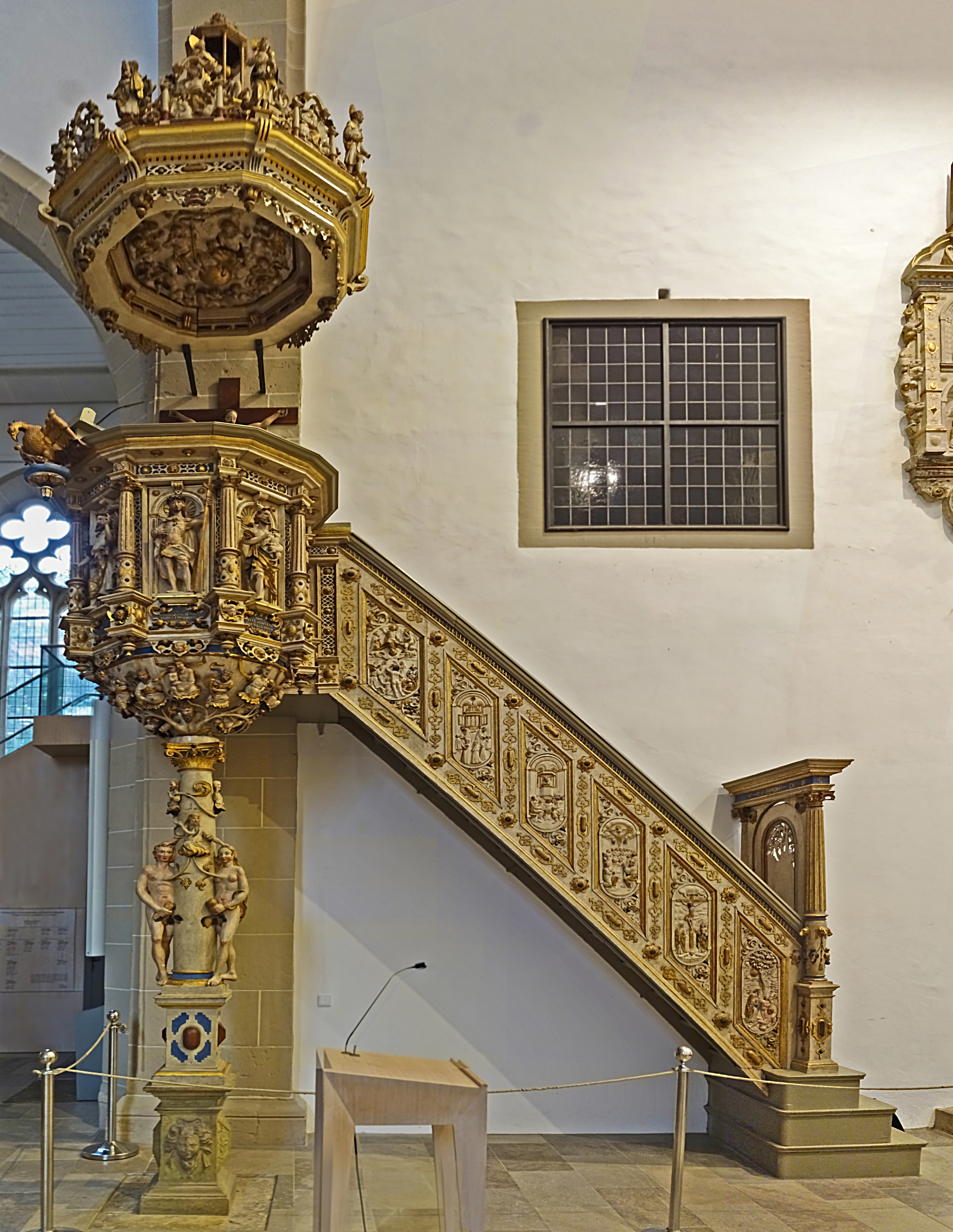 die Kanzel der Kaufmannskirche Erfurt